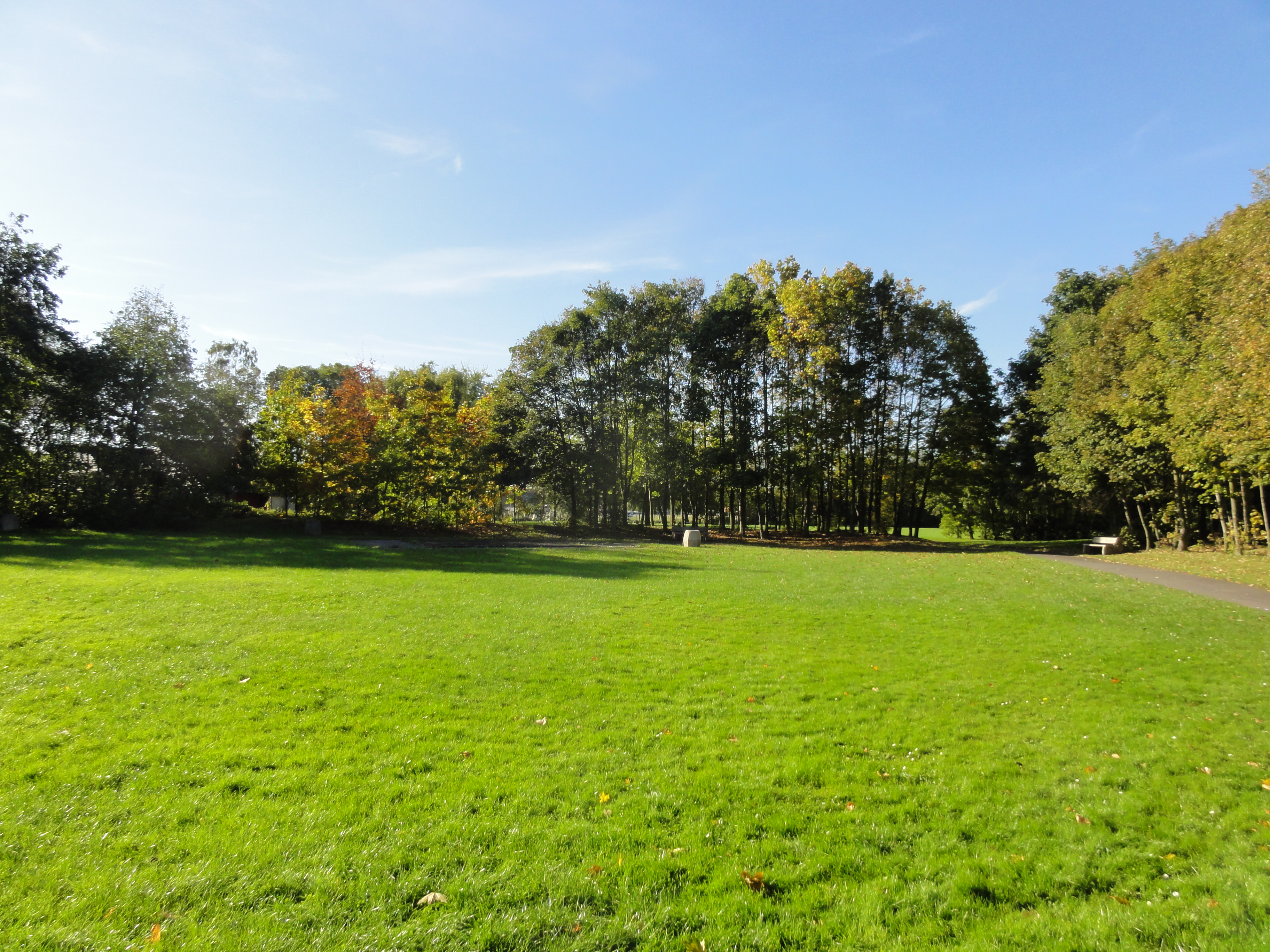 Terril n° 106 dit 23 de Courrières, disparu, fosse n° 23 de la Compagnie des mines de Courrières dans le bassin minier du Nord-Pas-de-Calais, Noyelles-sous-Lens, Pas-de-Calais, Nord-Pas-de-Calais, France.